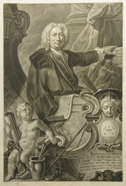 Portrait von Johann Georg Bergmüller (1688–1762).